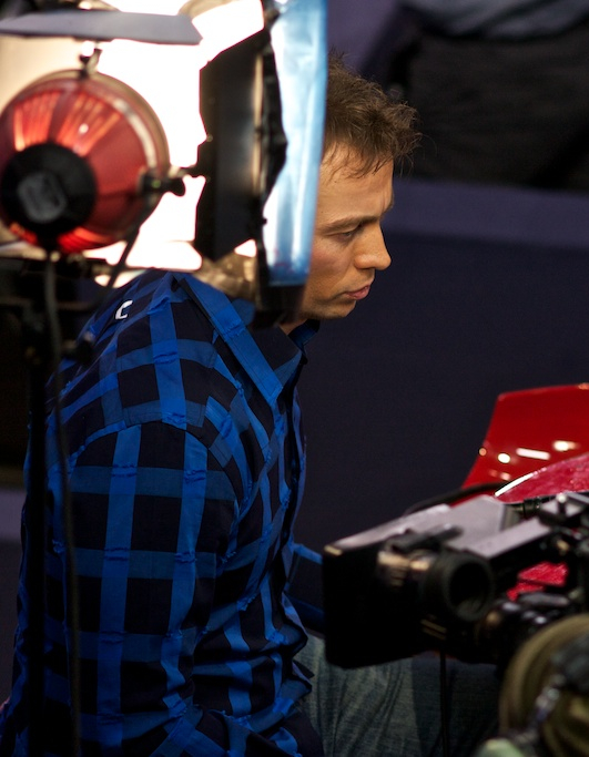 Henry Schut tijdens de Europese kampioenschappen kortebaanzwemmen 2010 te Eindhoven.